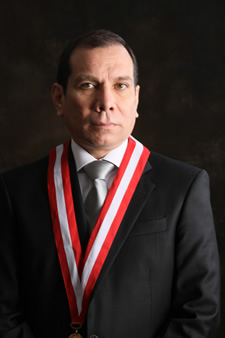 Juez Titular de la Corte Suprema de Justicia de la República del Perú.